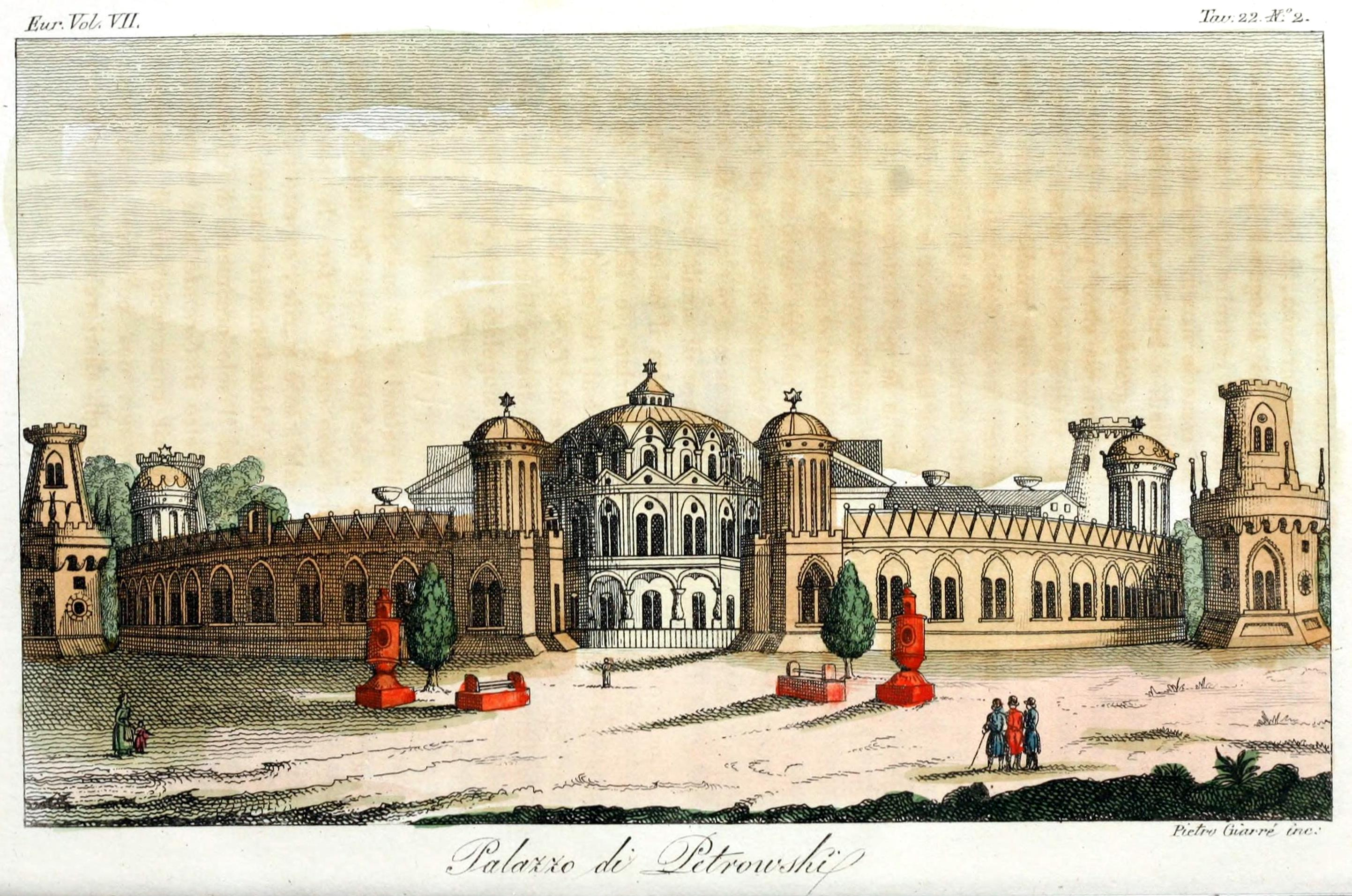 Petrovsky Palace